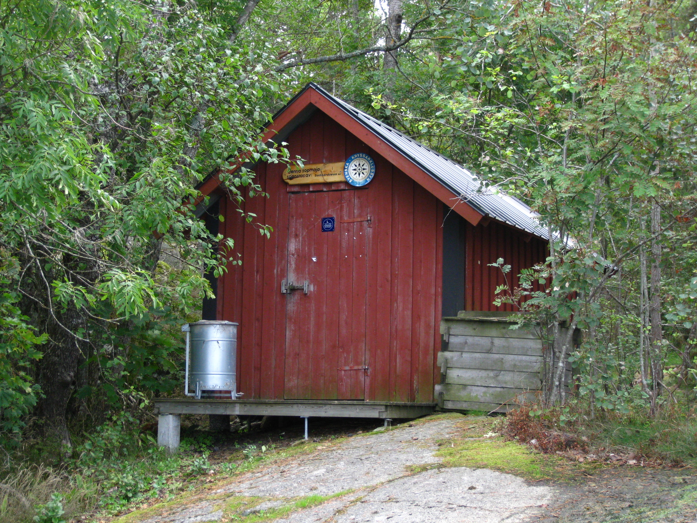 Skärgårdsstiftelsens skärgårdsmaja, Träskö-Storö, Värmdö kommun, Stockholms skärgård.